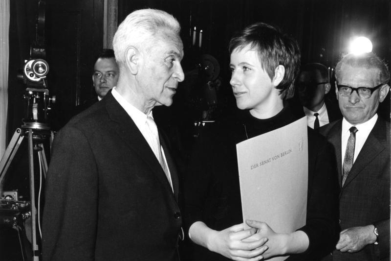 18.3.1965 Berlin/West Berliner Kunstpreise 1965 übergeben im Charlottenburger Schloß Staatsschauspieler Ernst Deutsch, Berliner Kunstpreis (Abteilung Darstellende Kunst) Heidemarie Theobald, Preis "Junge Generation"